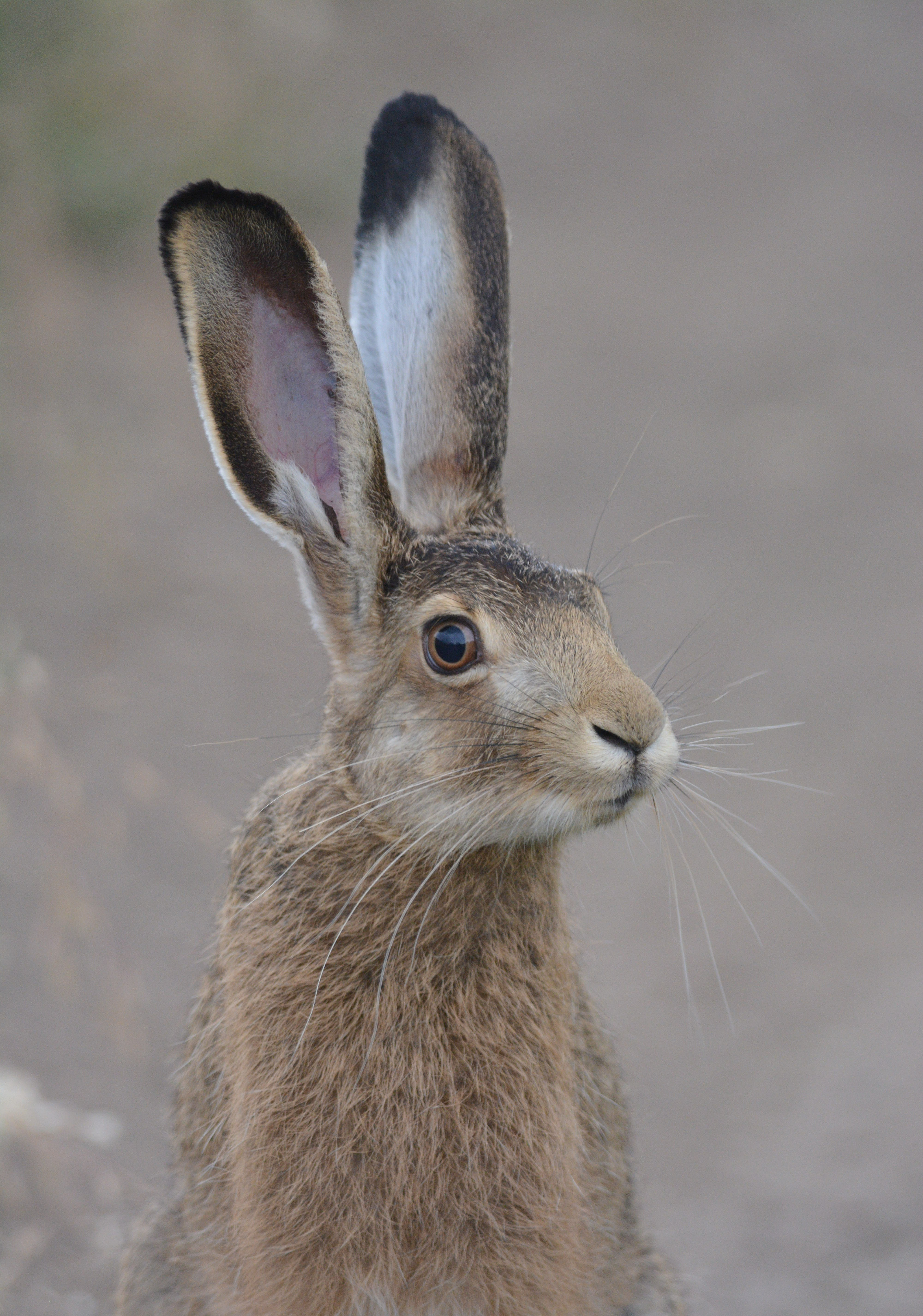 «Кармелюкове Поділля», Чечельницький р-н, Демівська сільська рада